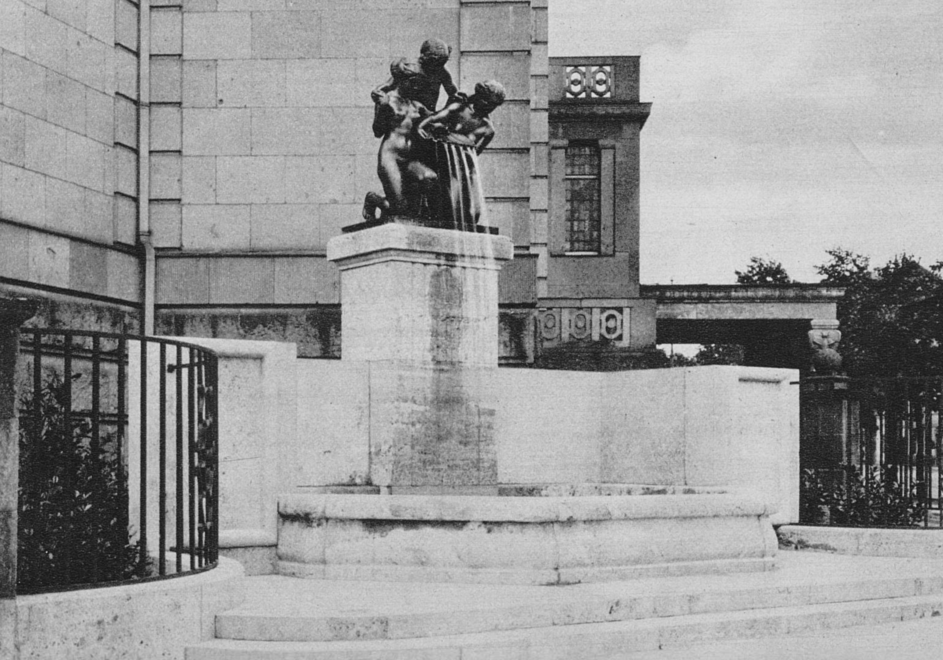 Der neue Brunnen vor dem Landeshaus in Düsseldorf, ein Werk des Bildhauers Leon Lauffs. Foto E. Lichtenberg (1915)